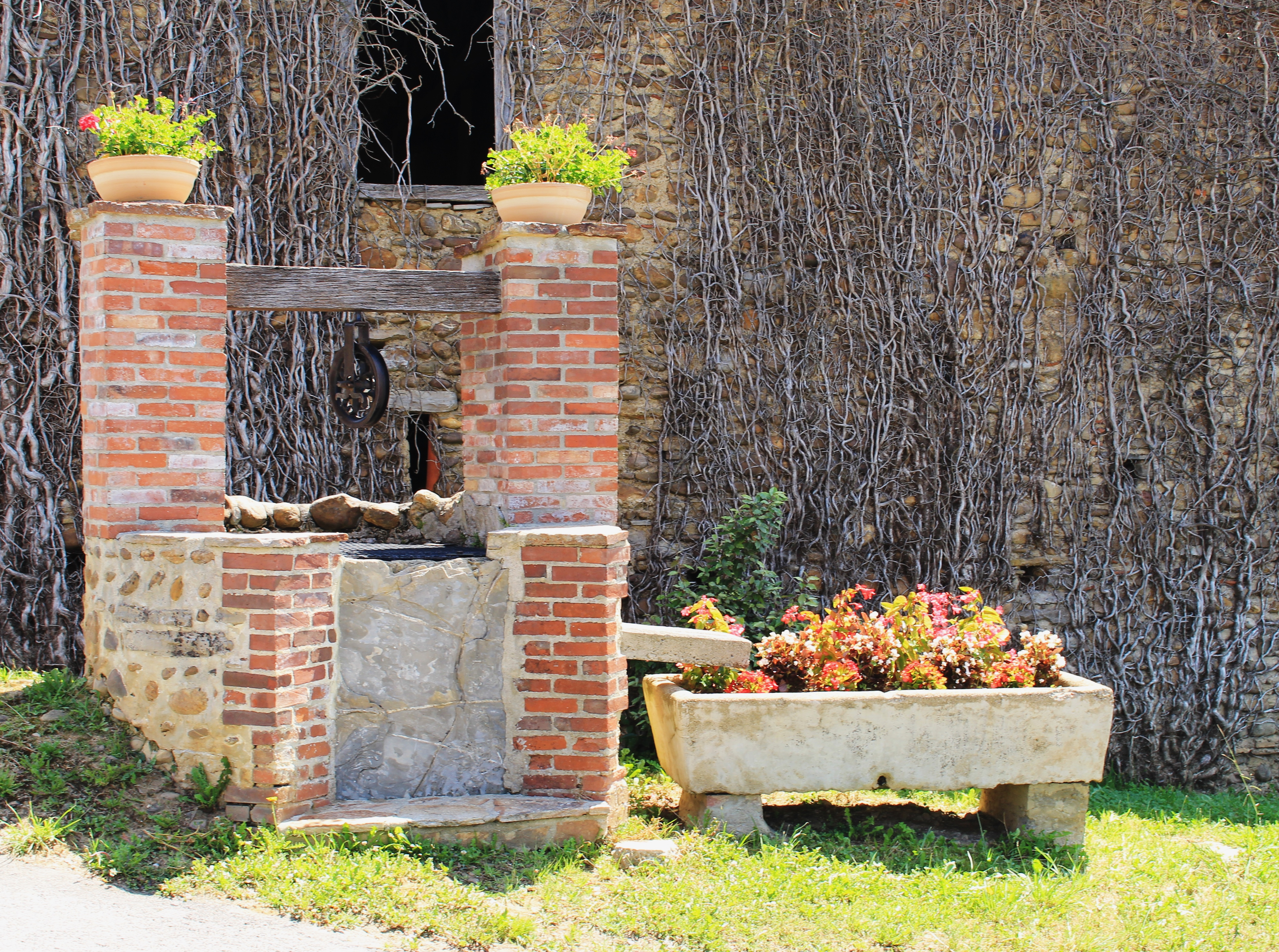 Puits de Peyraube (Hautes-Pyrénées)